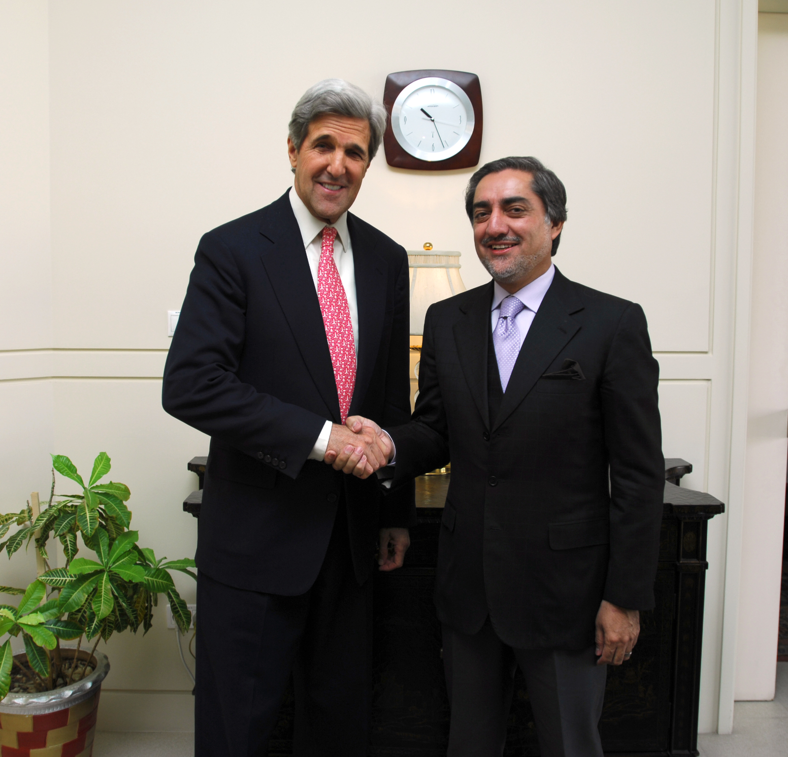 U.S. Senator John Kerry with Afghan Presidential candidate Abdullah Abdullah in Kabul, Afghanistan.